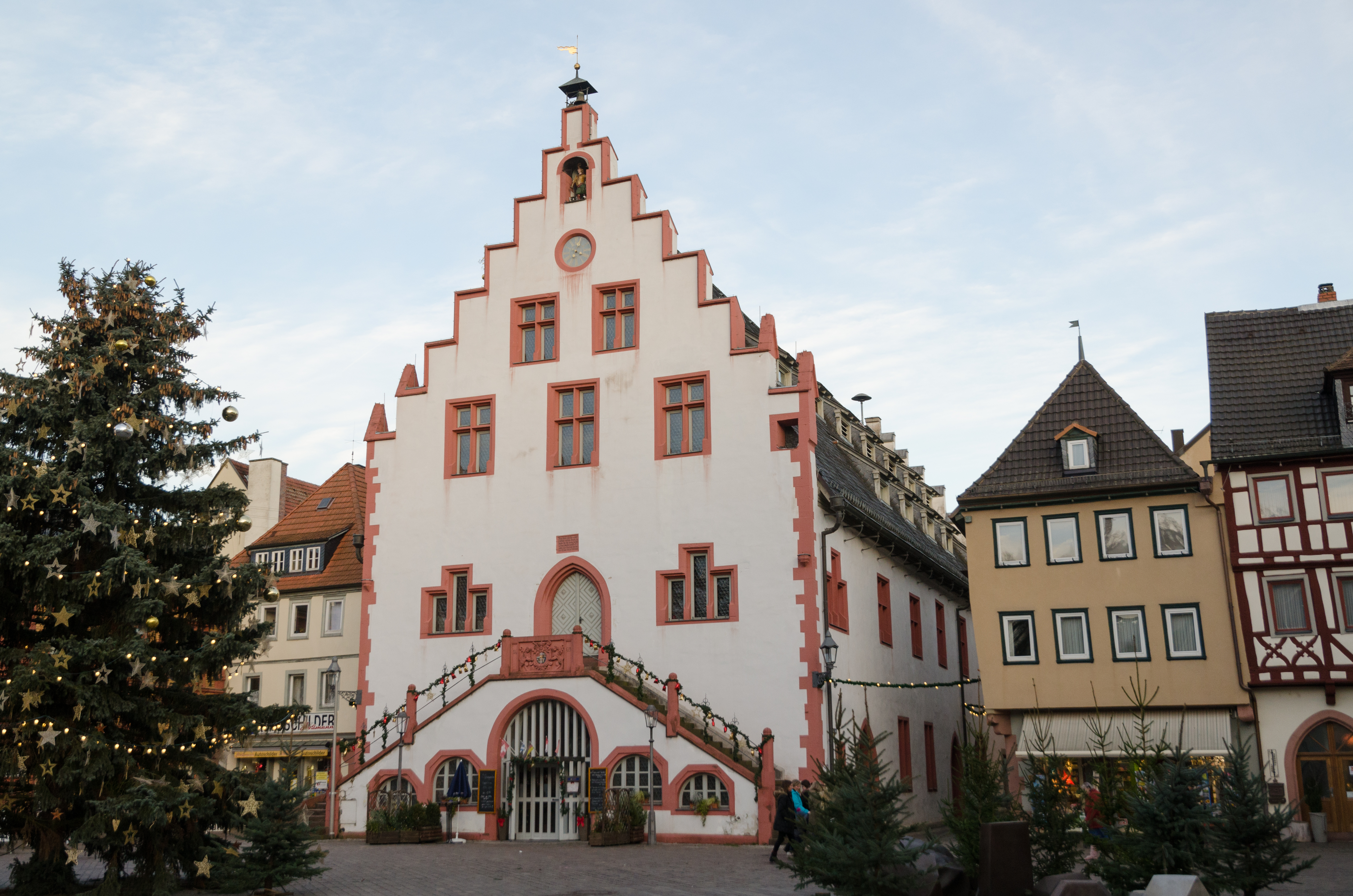 Karlstadt, Marktplatz 1, Rathaus